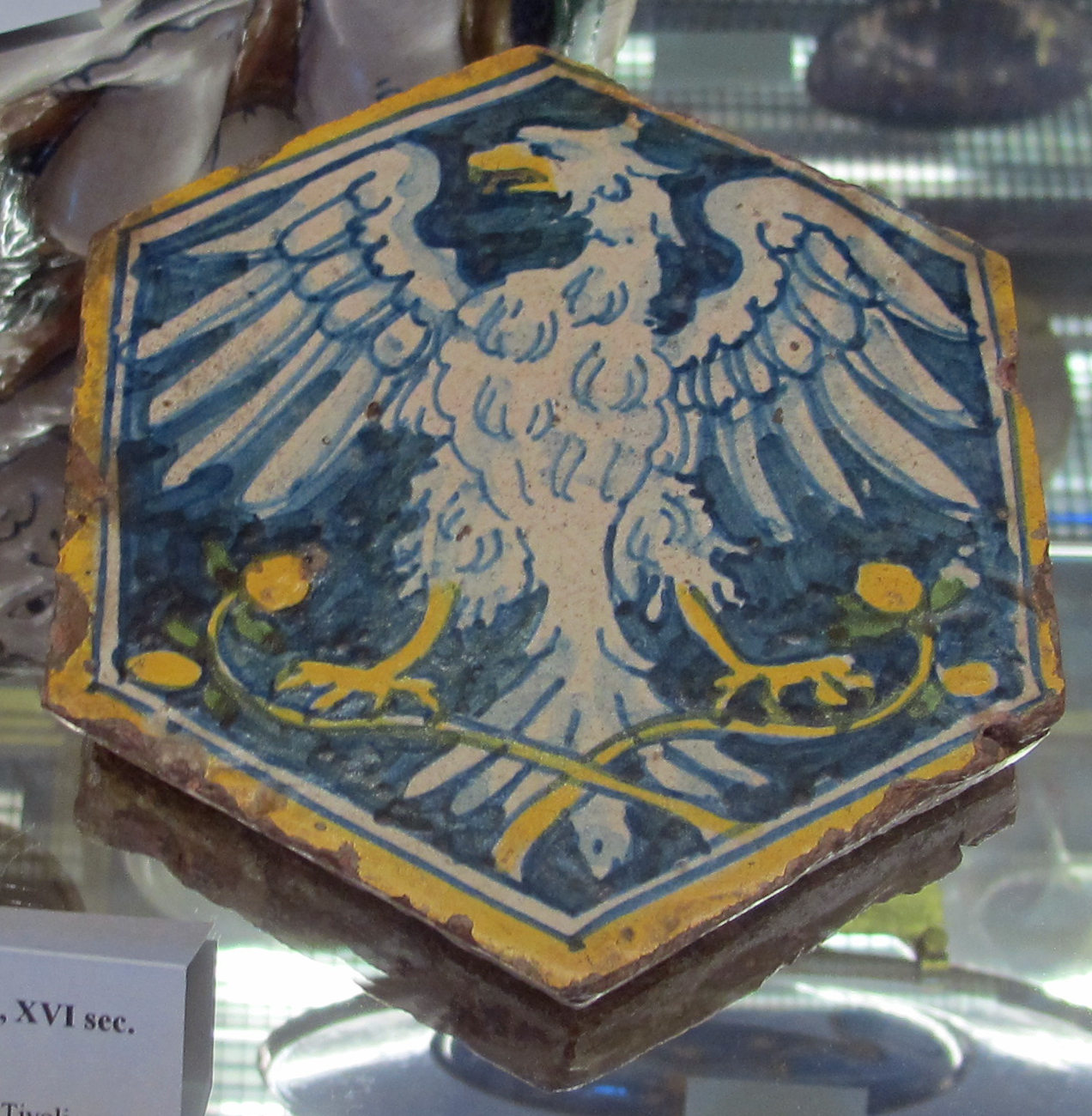 Italia centrale, mattonella con aquila da villa d'este a tivoli, xvi sec